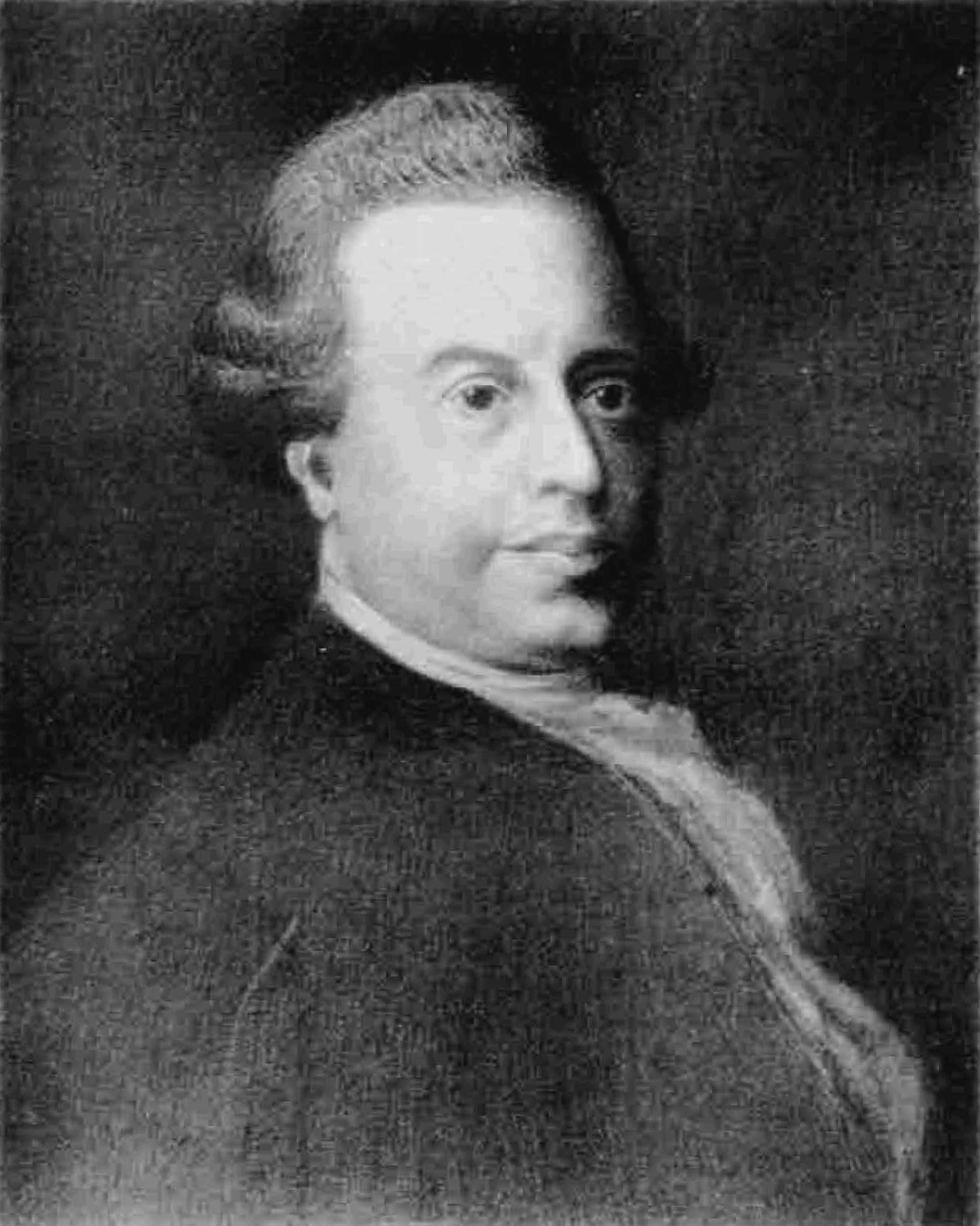 Портрет Григория Андреевича Полетики